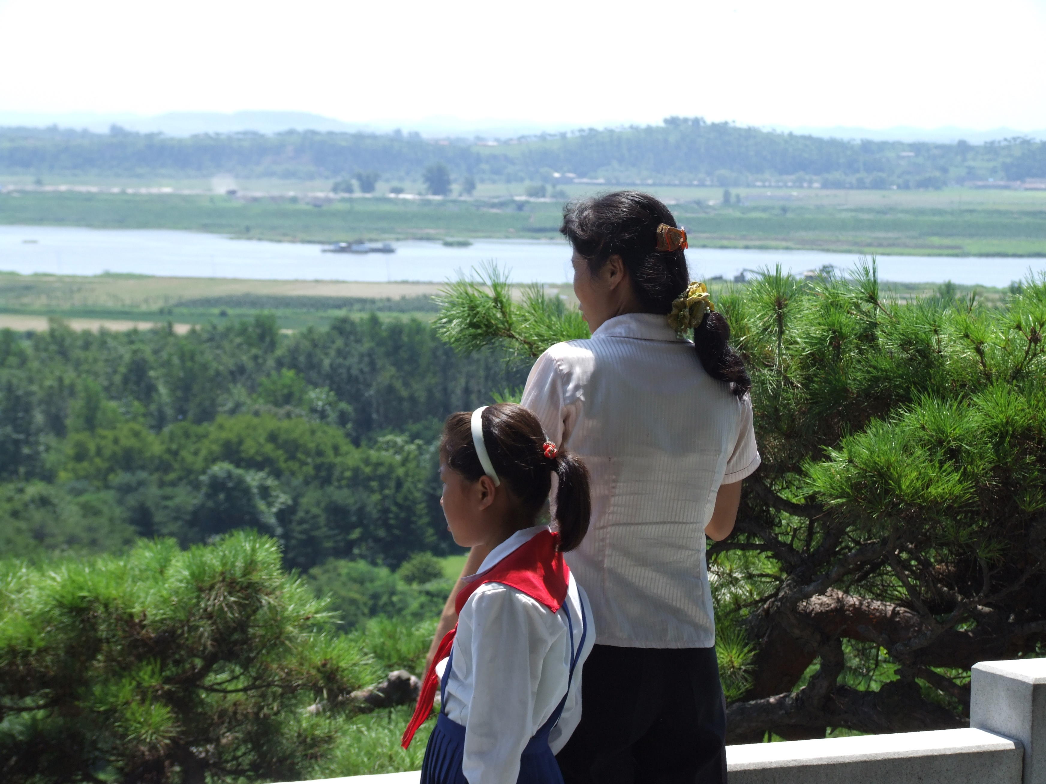 Auf dem Mangyong-Hügel in Mangyŏngdae